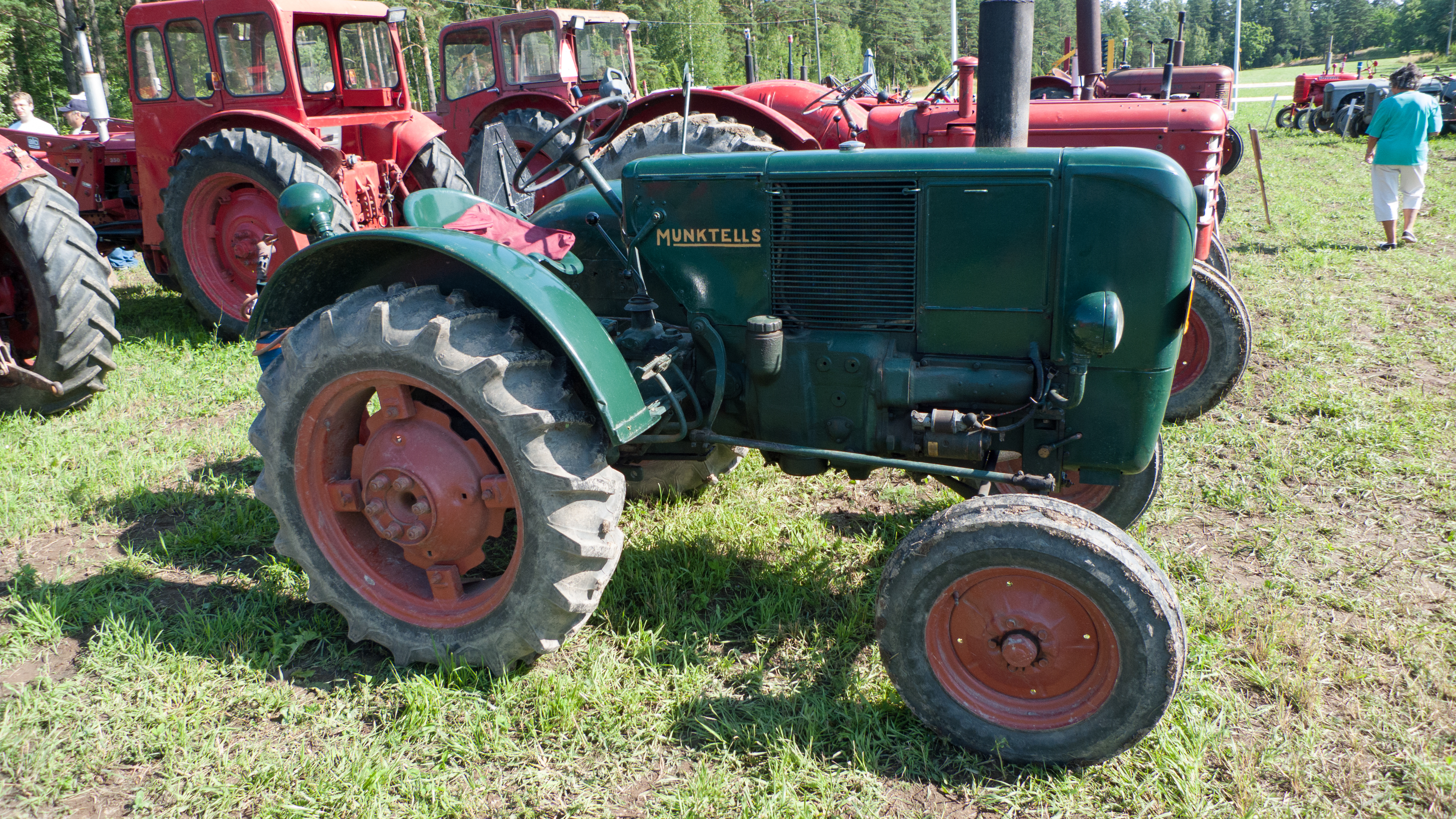 Munktells traktori